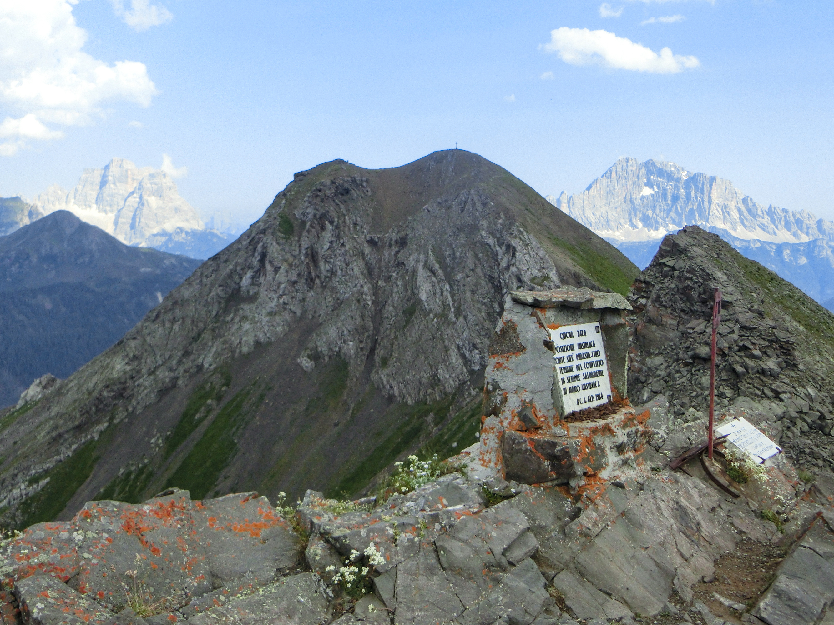 Col di Lana - Settsas - Cherz (Q49963651)